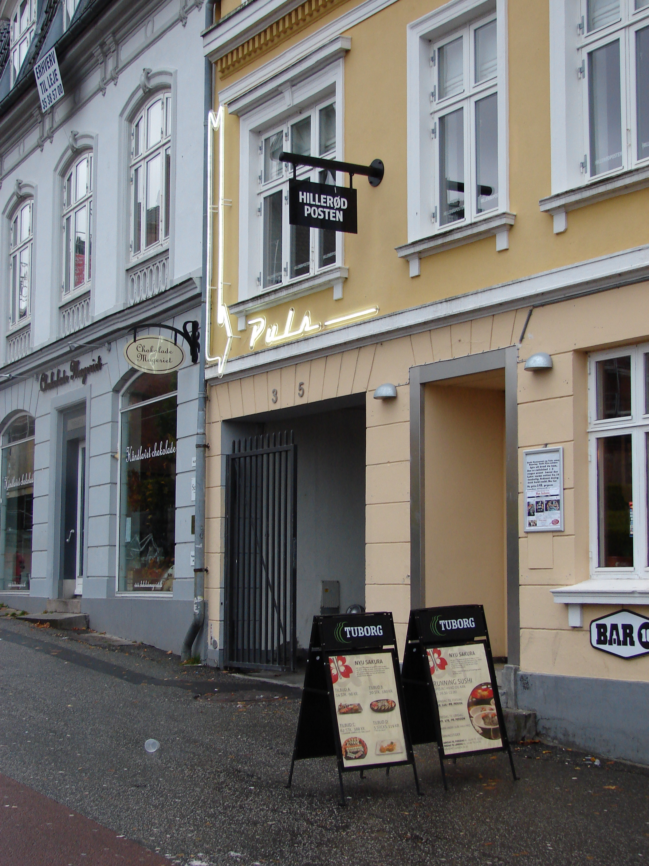 Hillerød Posten, Sjælland